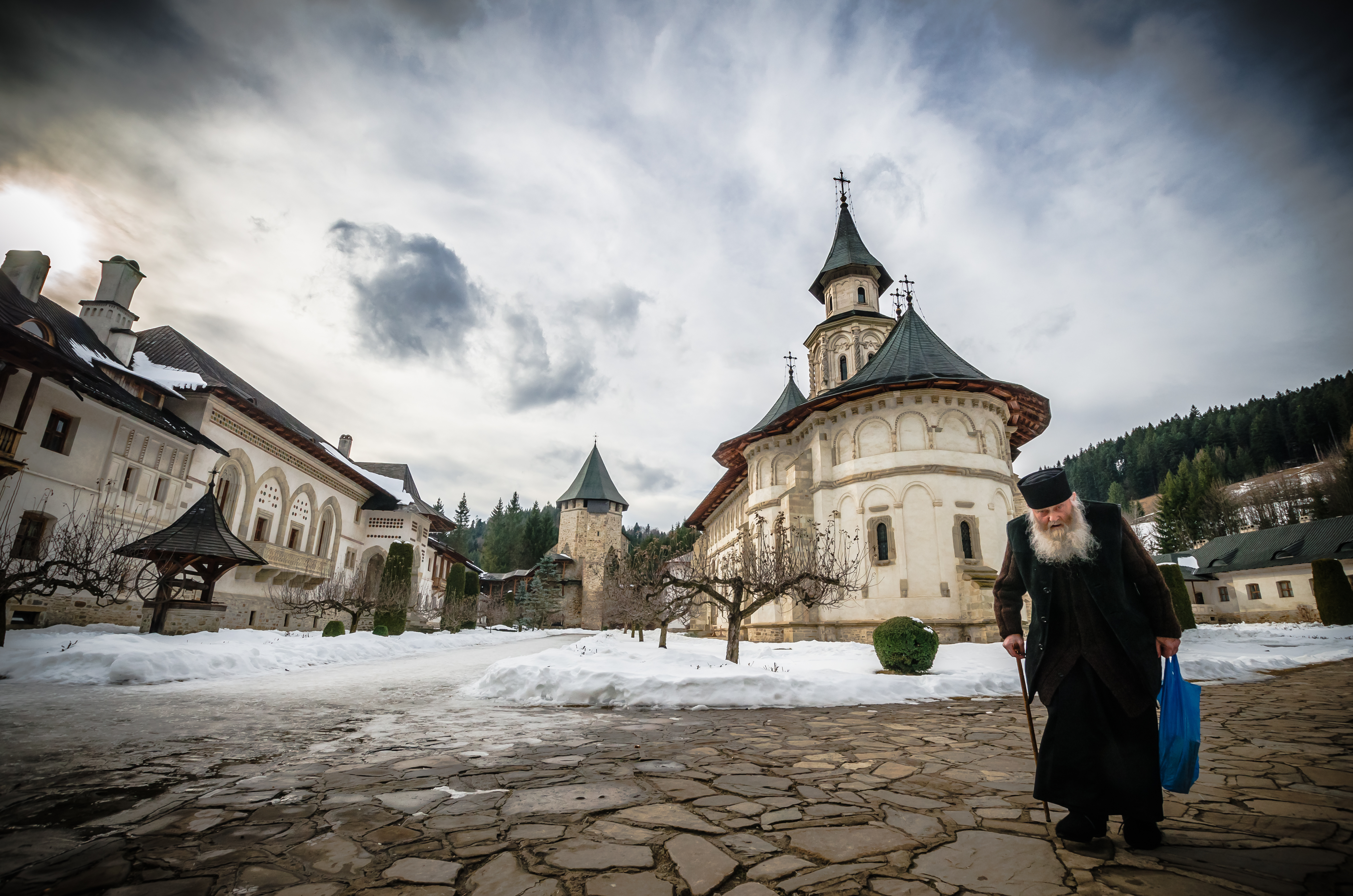 Una dintre cele mai frumoase manastiri din Bucovina, Manastirea Putna reprezinta un monument bine cunoscut peste hotarele Romaniei. Aceasta imagine a fost surprinsa intr-o dupa-amiaza calda a sfarsitului iernii 2014.